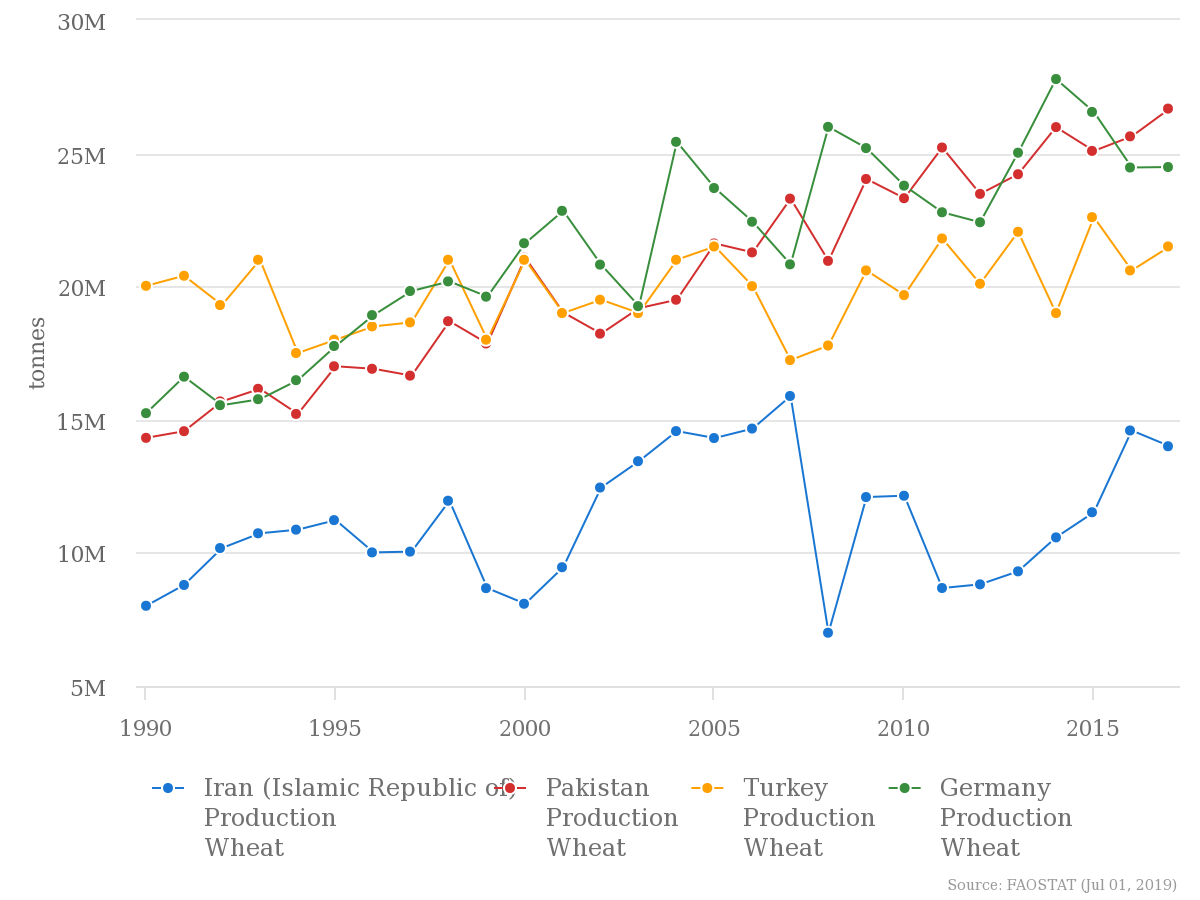 چارت گندم